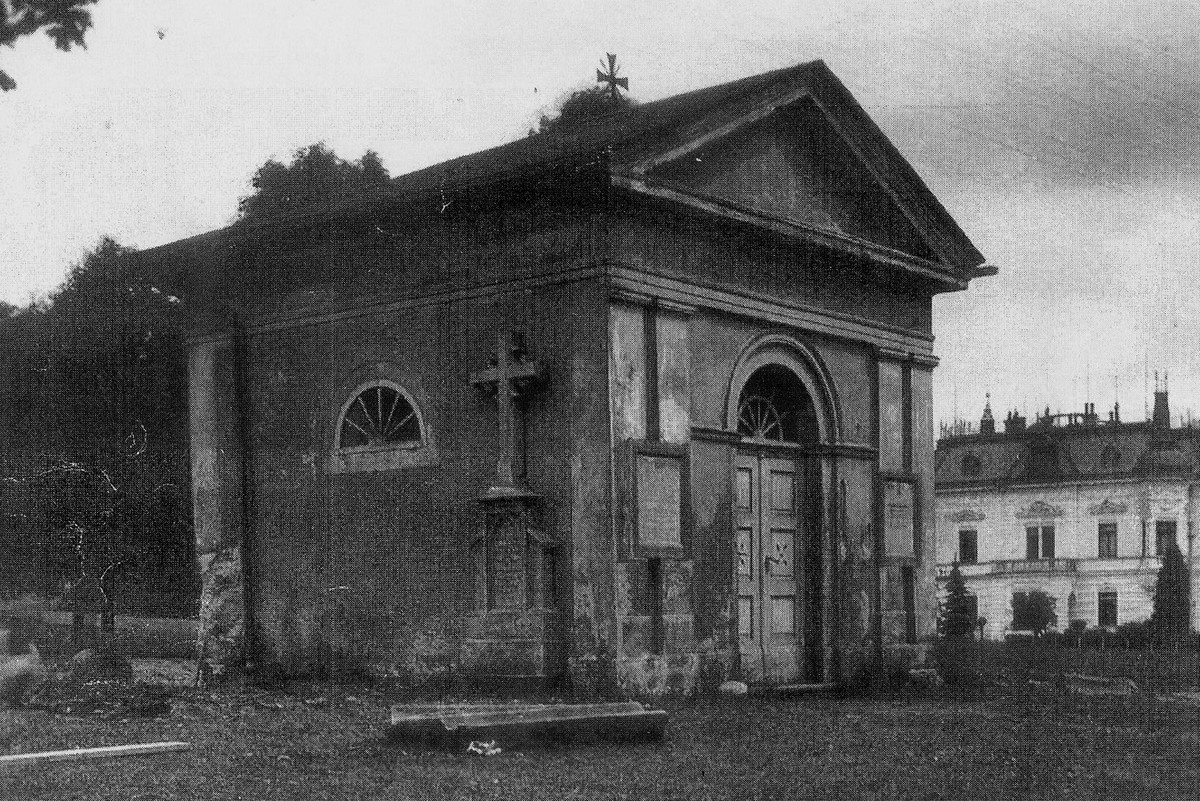 Ovčí kaple na dobové fotografii